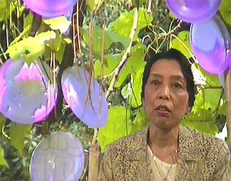 Portrait de Shigeko Hirakawa